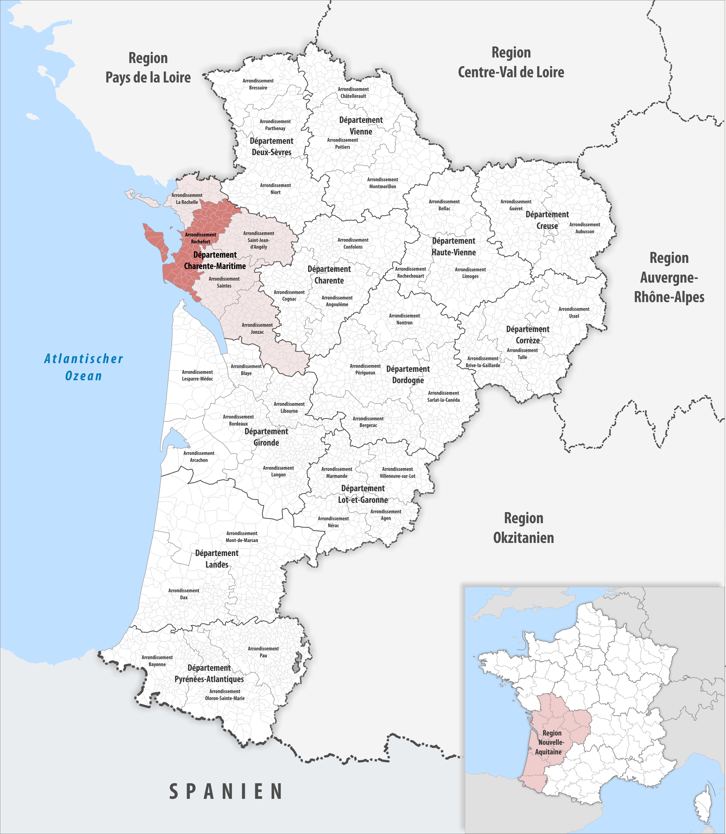 Lage des Arrondissements Rochefort